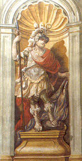 Iglesia parroquial de San Martín, Alberite (La Rioja), detalle de la decoración mural.